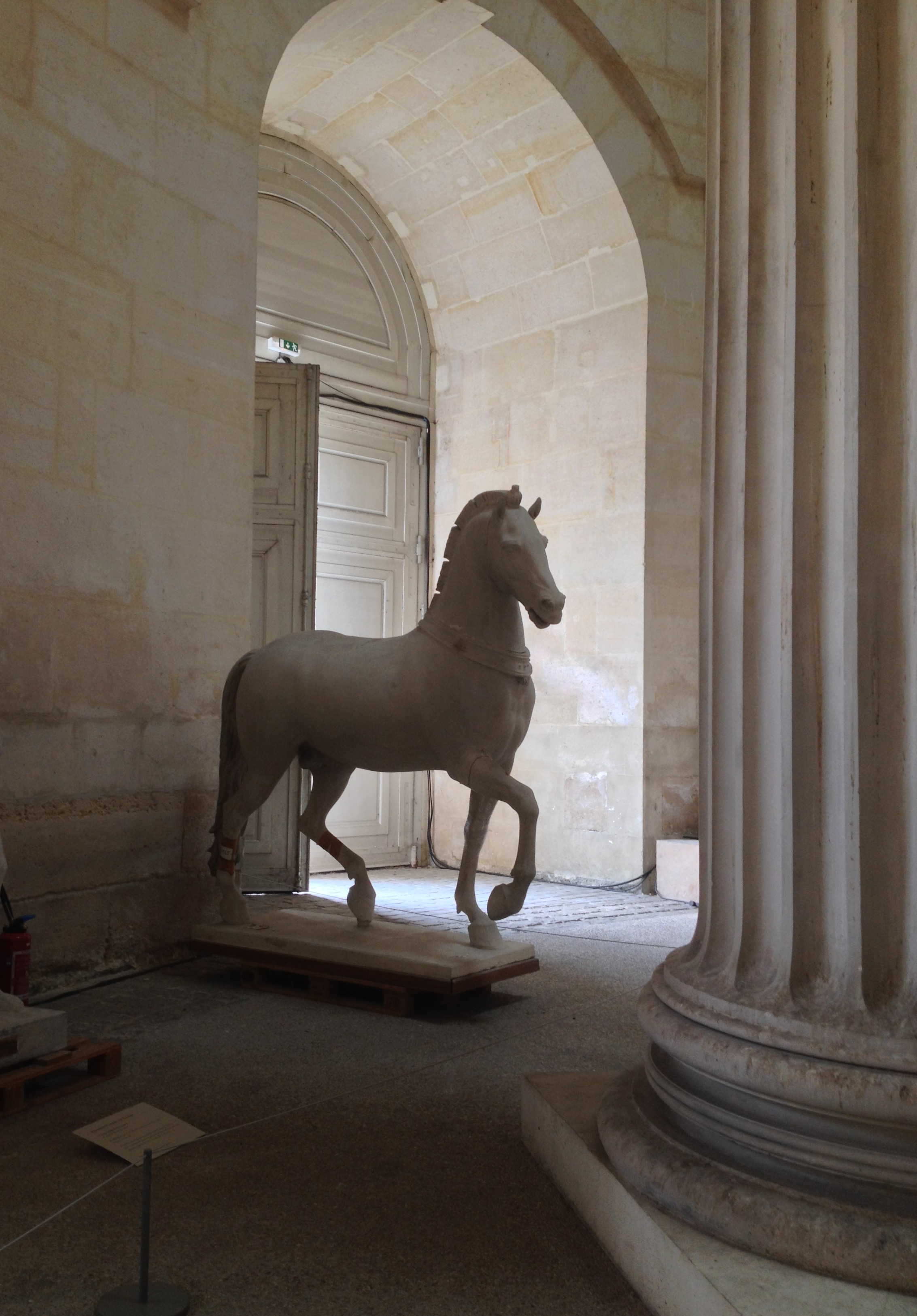 la Galerie des Sculptures et des Moulages à la Petite Ecurie à Versailles, au pied de la voûte .